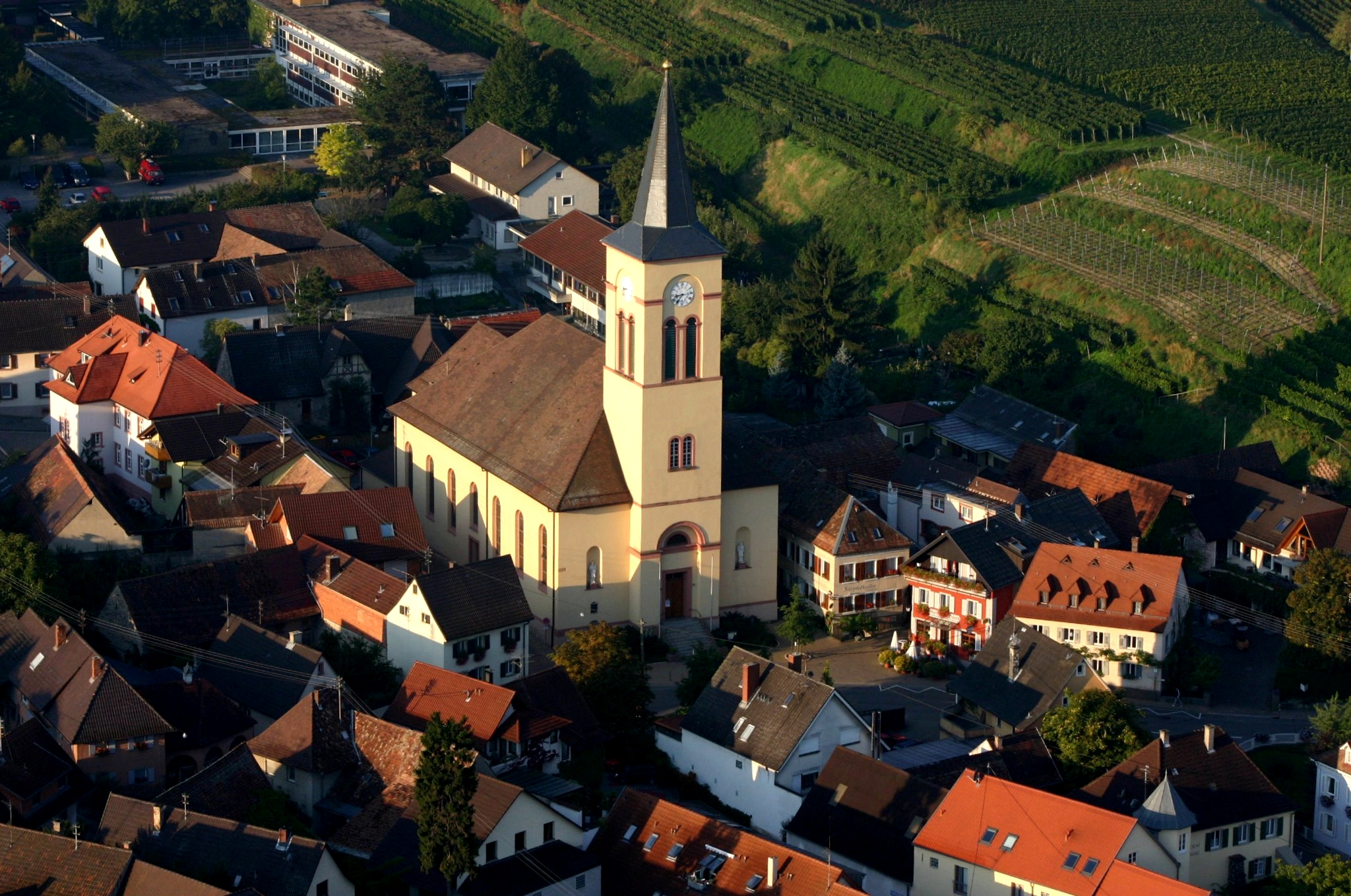 Luftbild von Oberrotweil aufgenommen bei einer Ballonfahrt